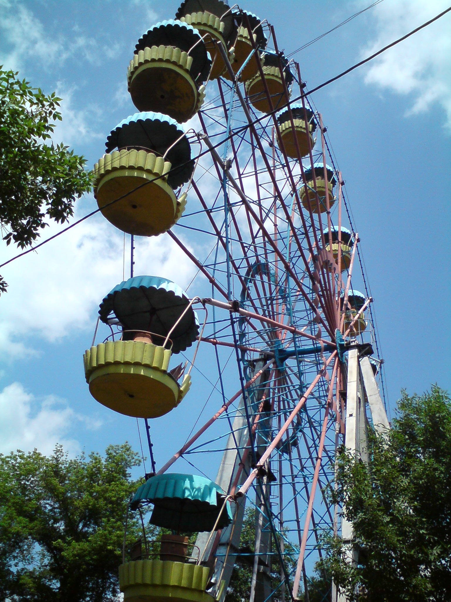 Алтайский край, г.Рубцовск, парк им. С.М. Кирова, аттракцион "Чёртово колесо"